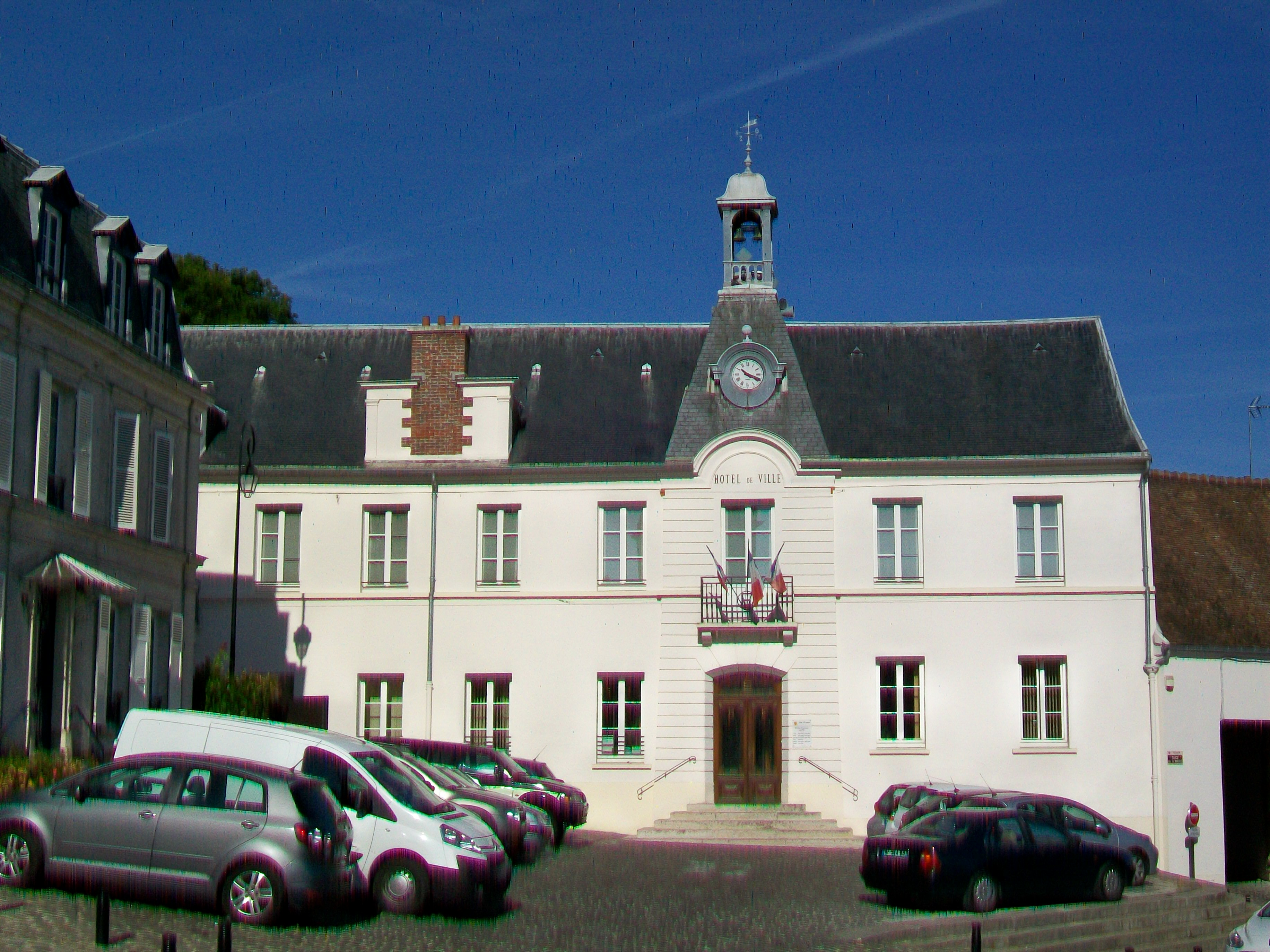 La mairie, place de la Mairie.